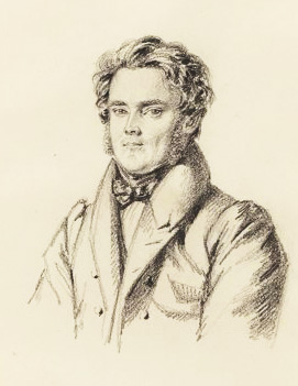 Carl Samuel Graffman (1802-1862)